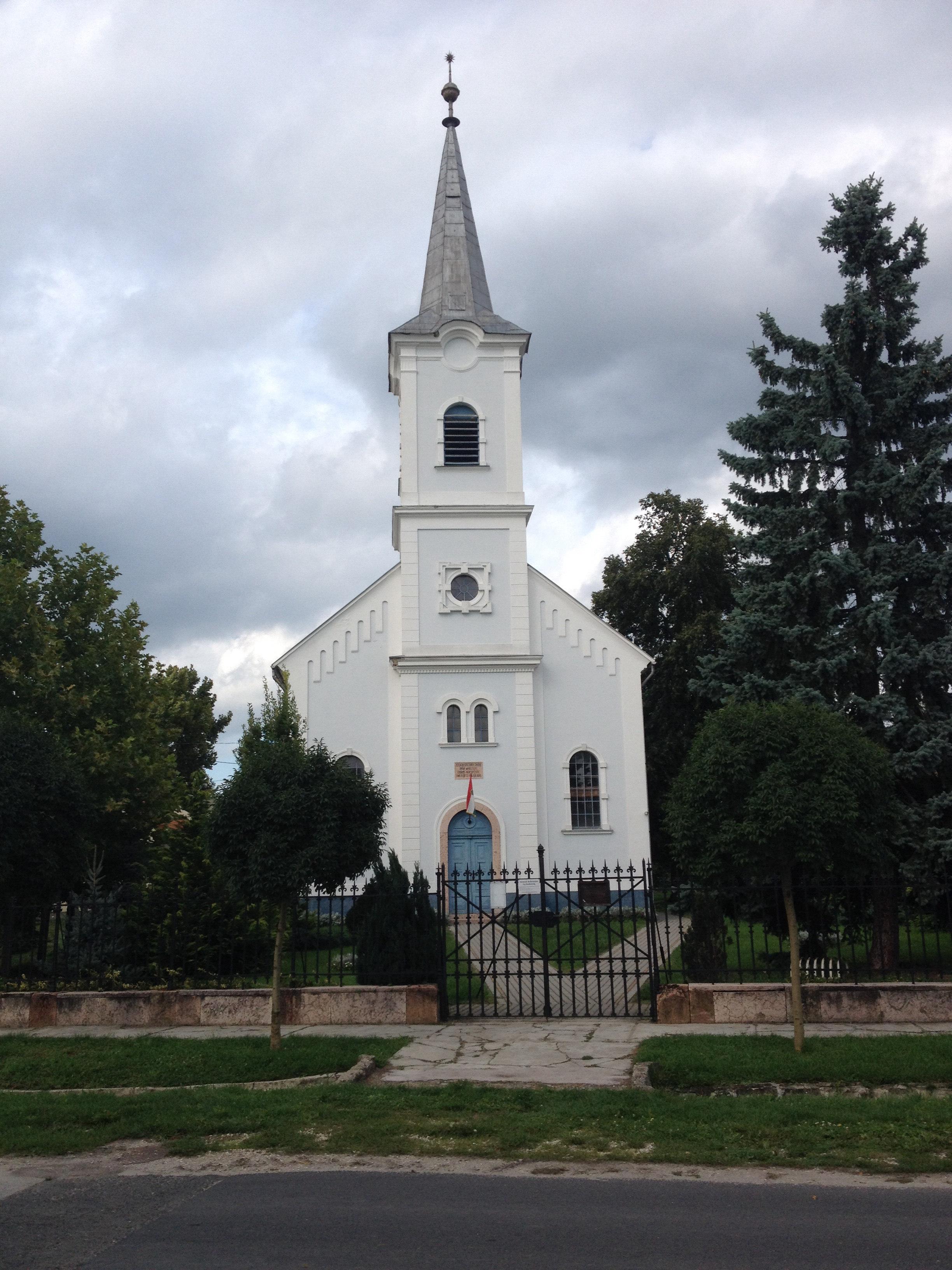 Gereformeerde kerk in Szómod - Hongarije.